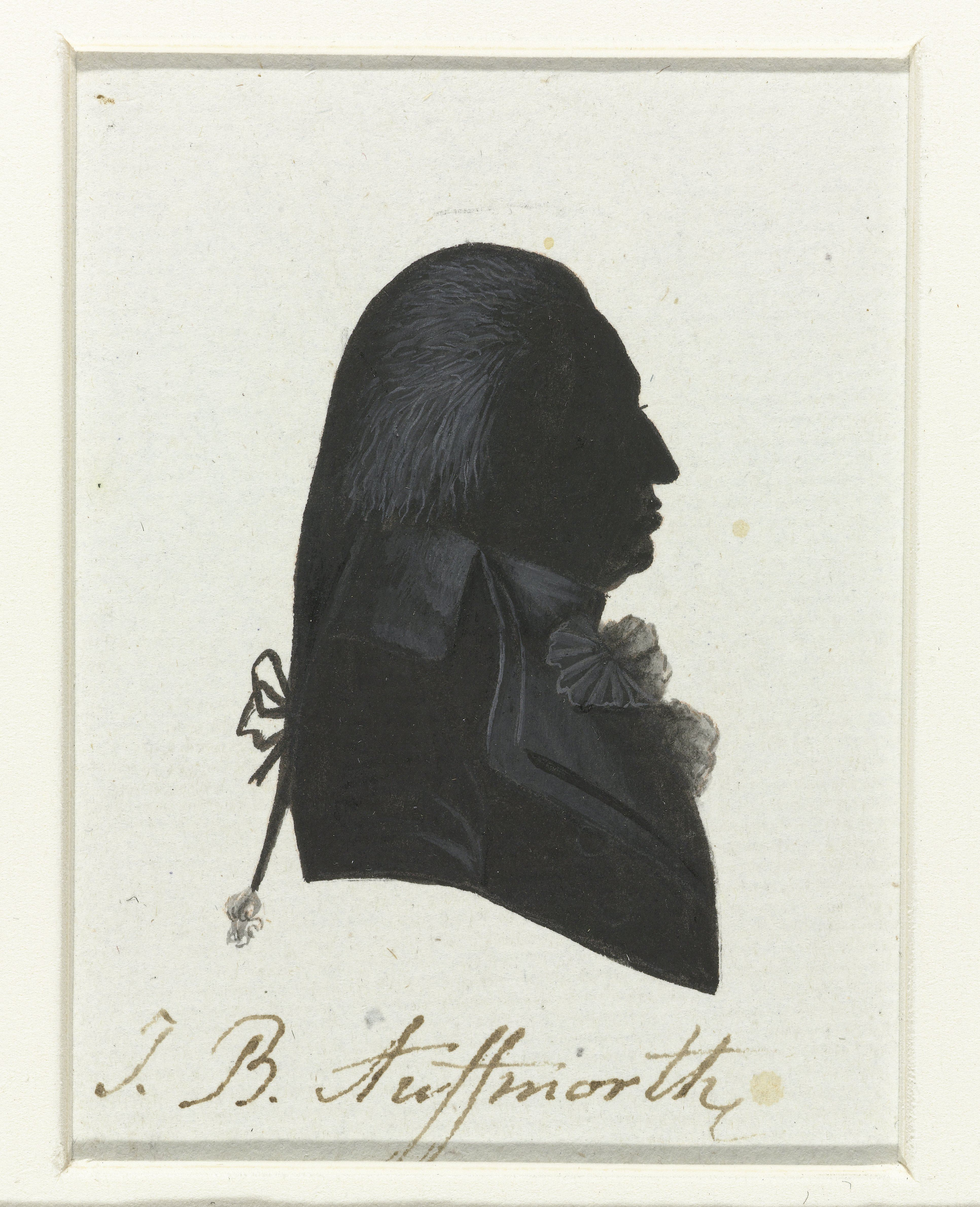 J.B. Auffmorth. Tekening in Oost-Indische inkt, waarschijnlijk gemaakt door Hausdorff. De tekening behoort tot een serie van portretten van afgevaardigden naar de Eerste Nationale Vergadering in 1796-1797. Van de serie werden gravures gemaakt die zijn afgedrukt in "Geschiedenis der staatsregeling, voor het Bataafsche volk", een boek van Cornelius Rogge (1799).